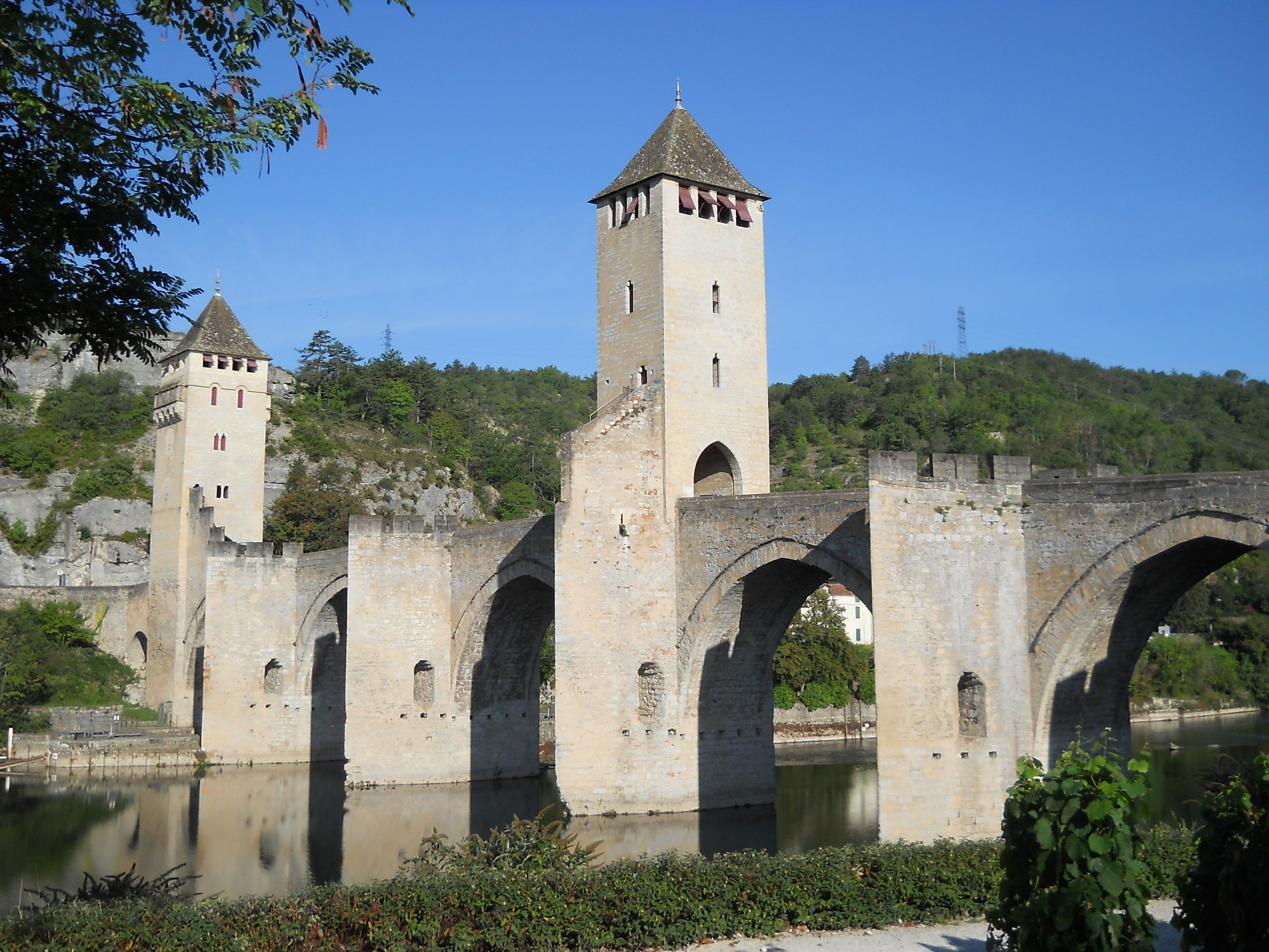 Pont Valentré, Cahors, Lot, France .